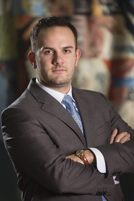 Српски (ћирилица): Др Стефан Самарџић